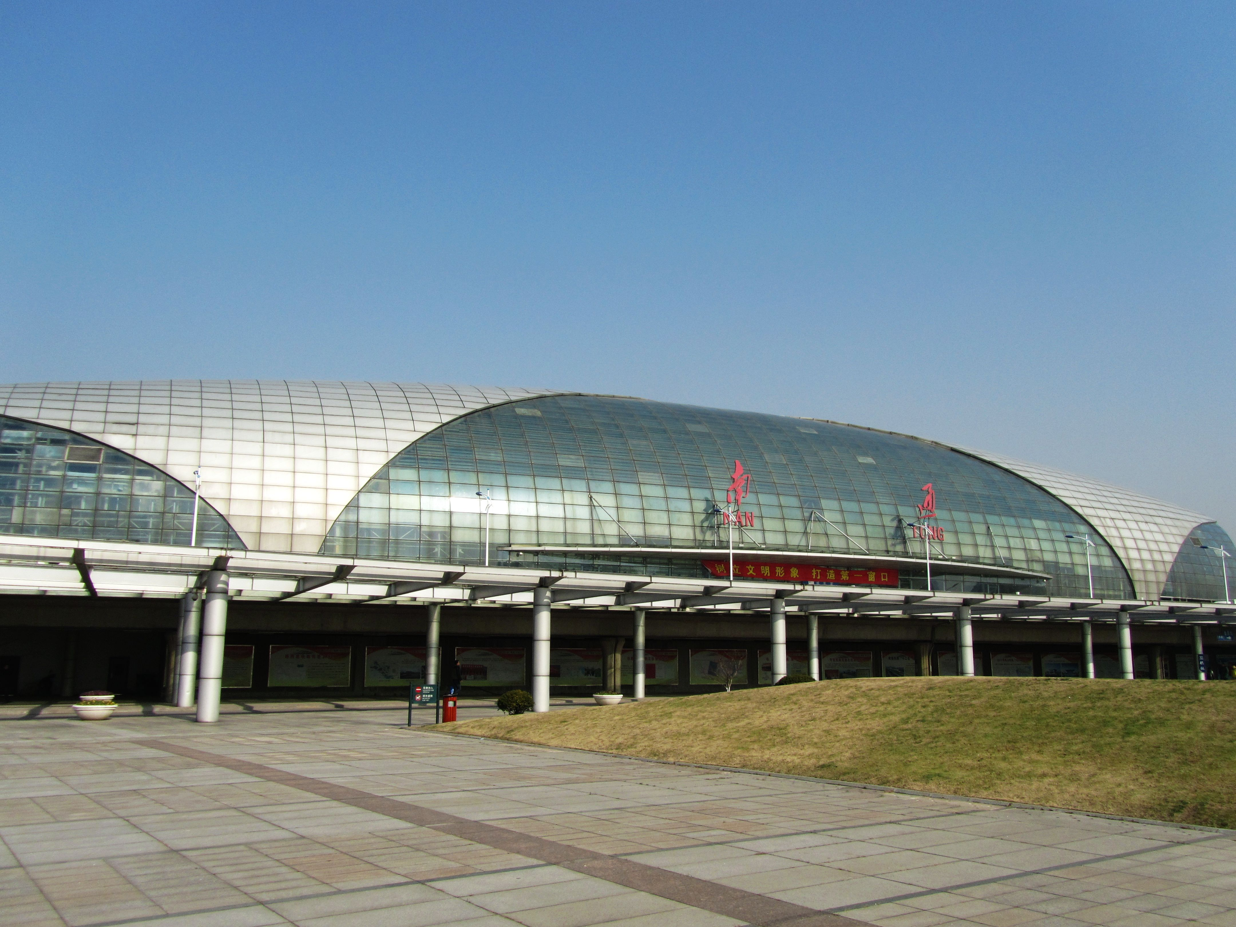 南通火车站站房。